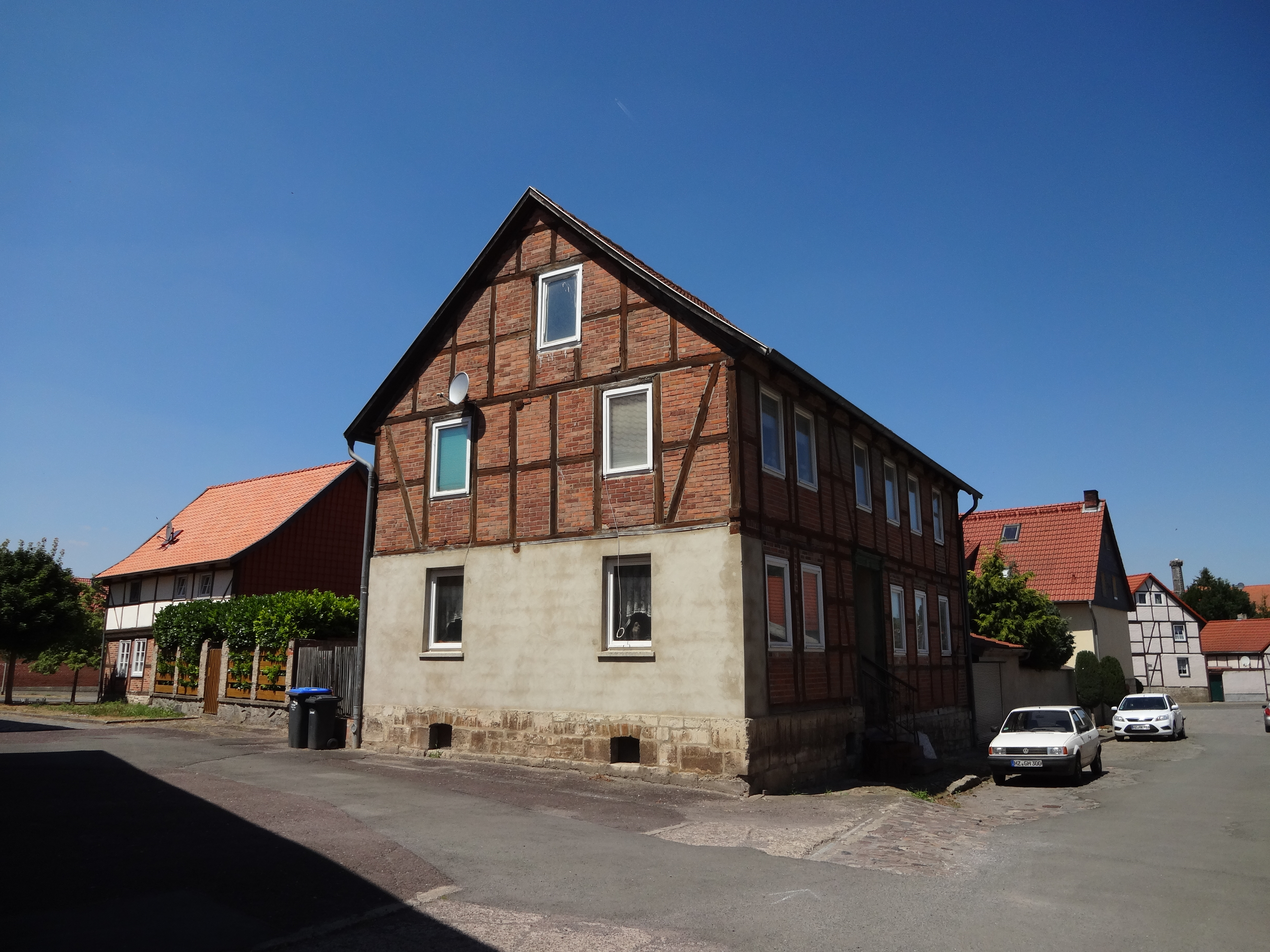 denkmalgeschütztes Wohnhaus in der Wrampestraße 4 in Dedeleben, Sachsen-Anhalt